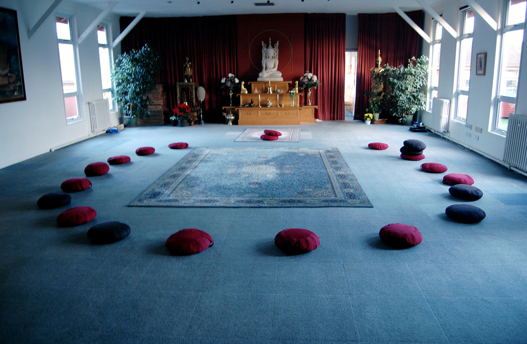 Amaravati Buddhist Monastery